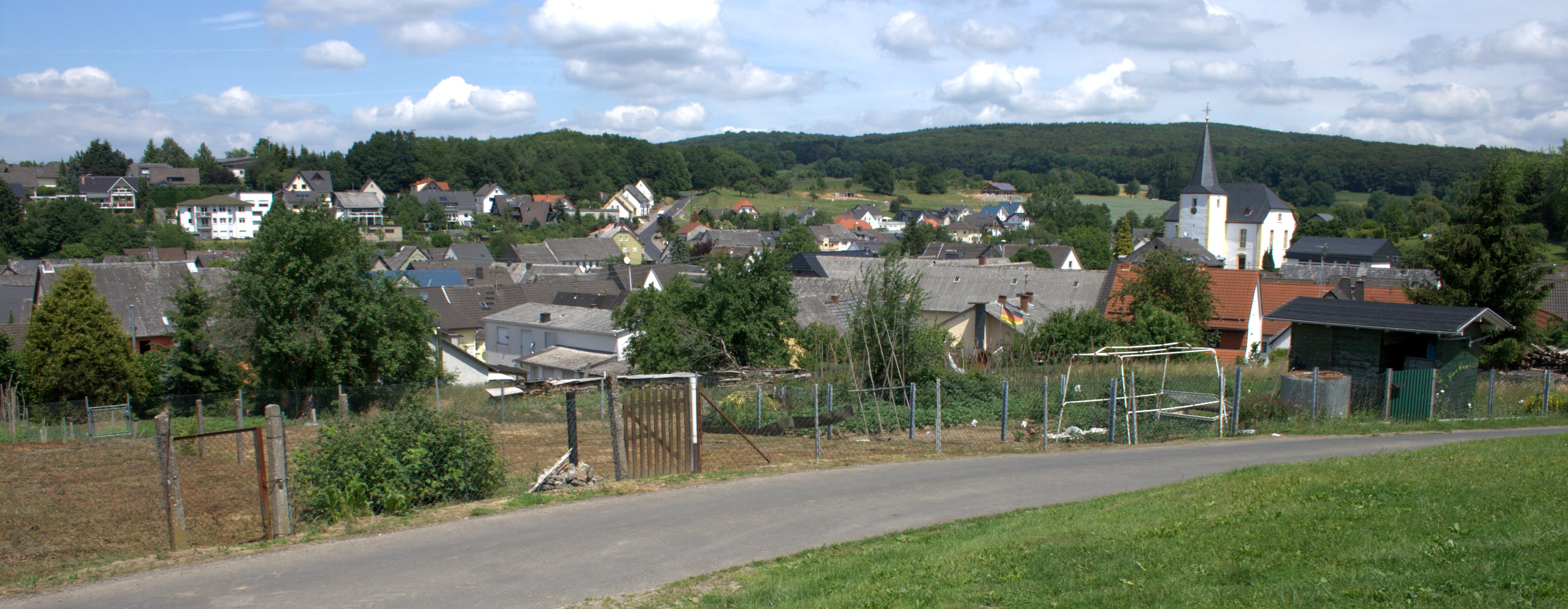 Blick über den Ortskern von Maxsain von südwesten. Rechts die evangelische Kirche, geradeaus die Straße Richtung Hartenfels, rechts daneben das Neubaugebiet